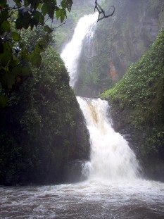 Fotografia tomada en el centro ecoturistico Tuliman ubicado en Zacatlán, Puebla